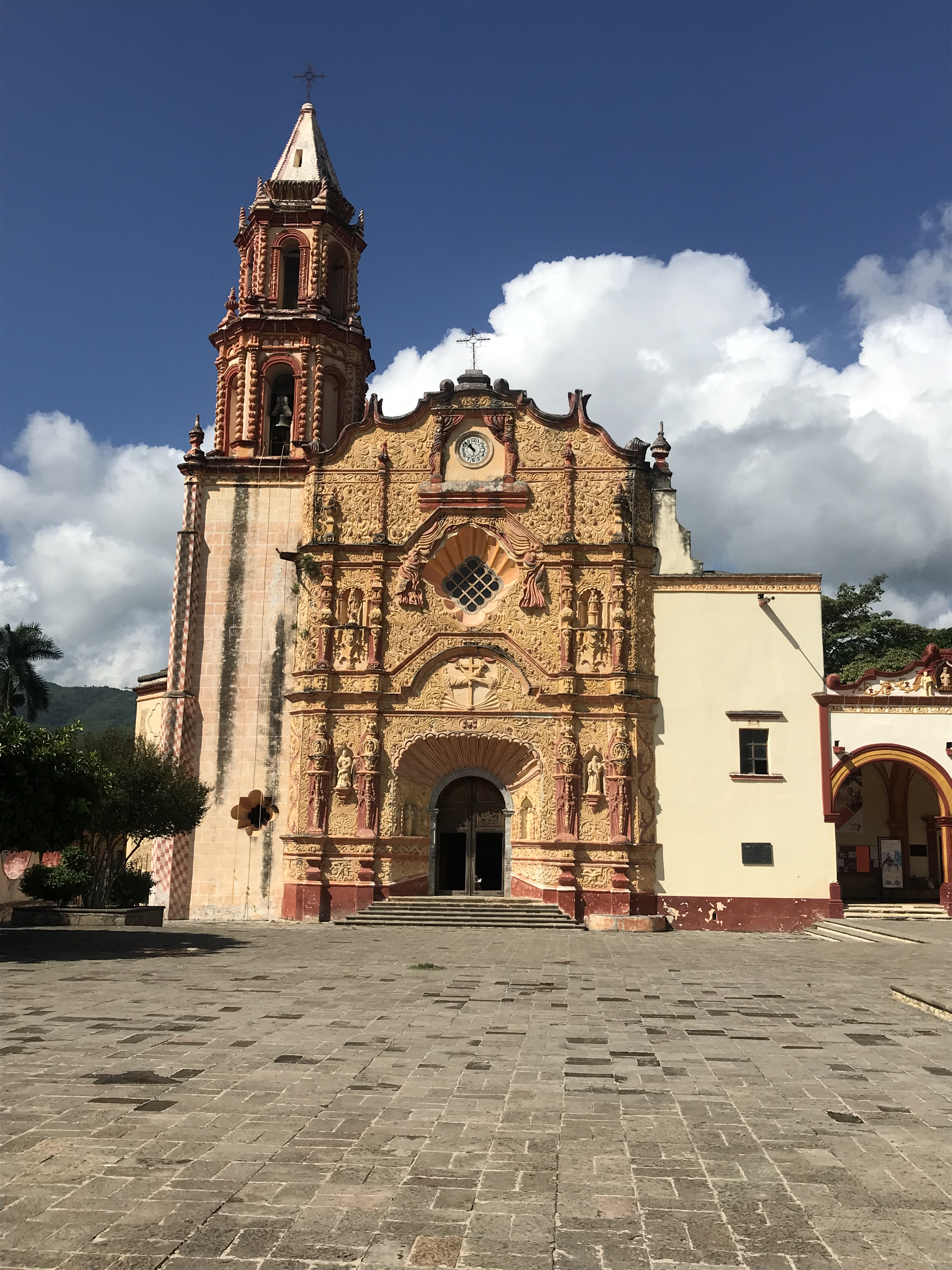 Foto de la Mision Santiago Apostol, con vista frontal